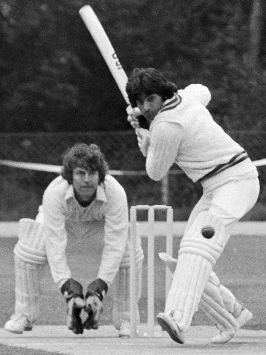 Cricket Nederland tegen Pakistan; Javed Miomdaal van Pakistan aan bat, achter hem de Nederlandse cricketkeeper Renee Schoonheim